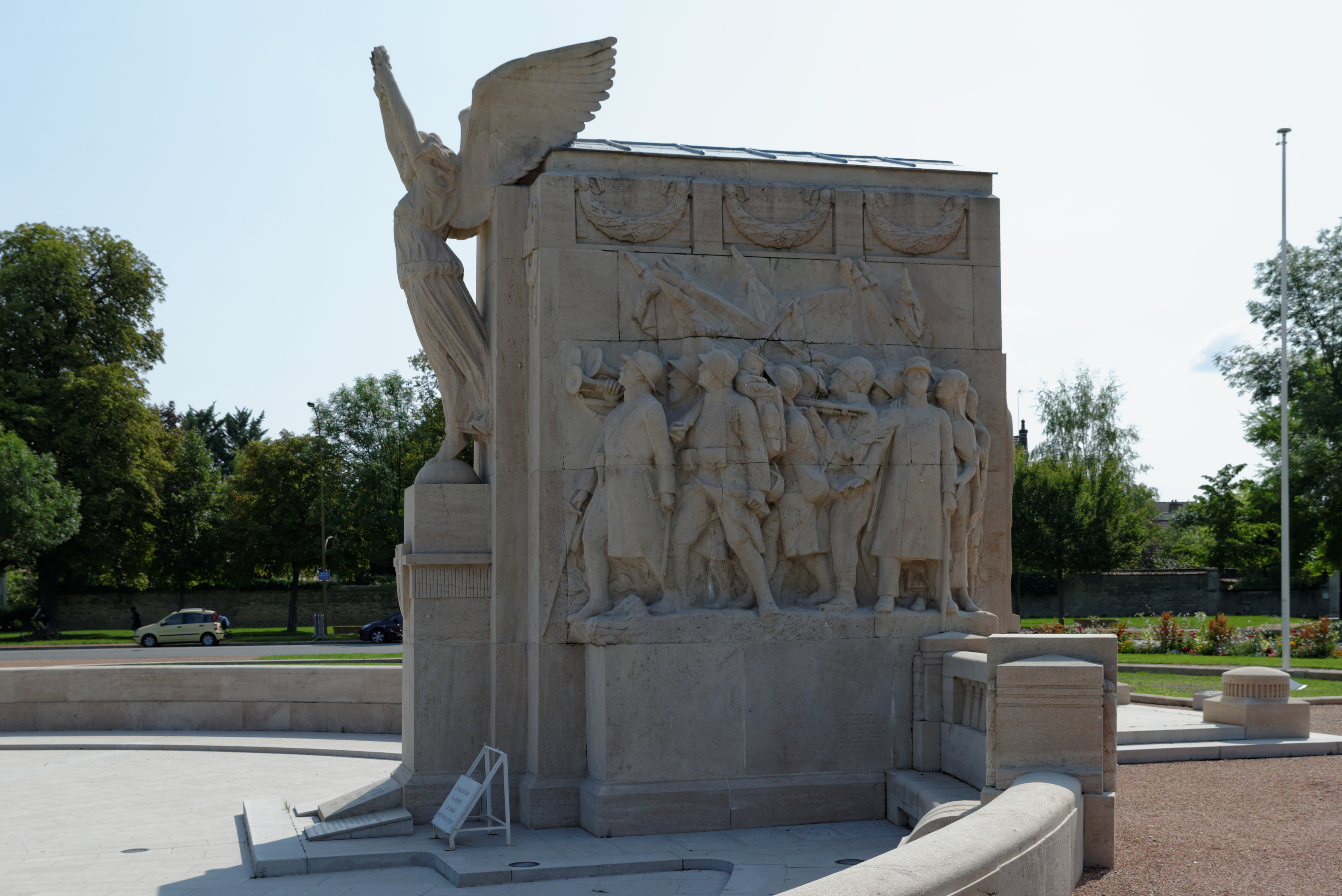 Représentation du retour de la guerre des soldats. Monument de la Victoire. Rond-point Edmond-Michelet entre le cours du Parc et le cours du Général de Gaulle. Réalisé par l'architecte Drouhot et les sculpteurs Paul Gasq, Eugène Piron, Jean Dampt et Henri Bouchard. A Dijon, (Côte d'Or, France).